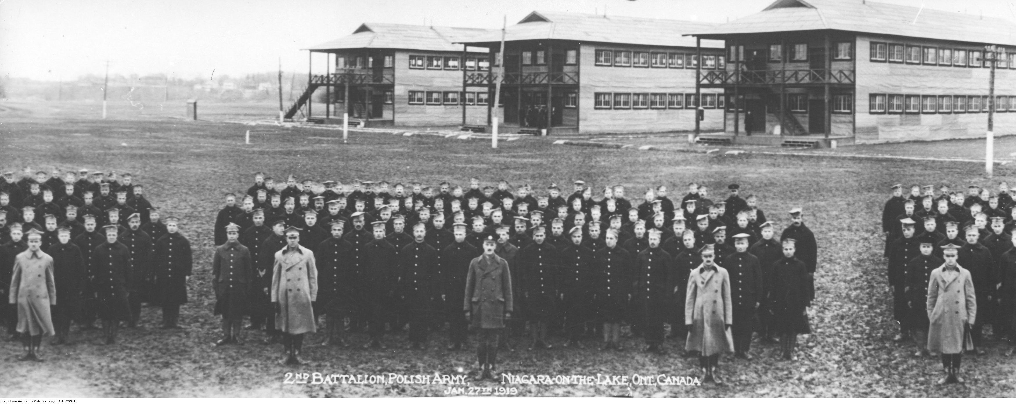 Obóz dla ochotników do Armii Polskiej we Francji Tadeusz Kosciuszko Camp w Niagara (Kanada) - żołnierze na tle baraków mieszkalnych.